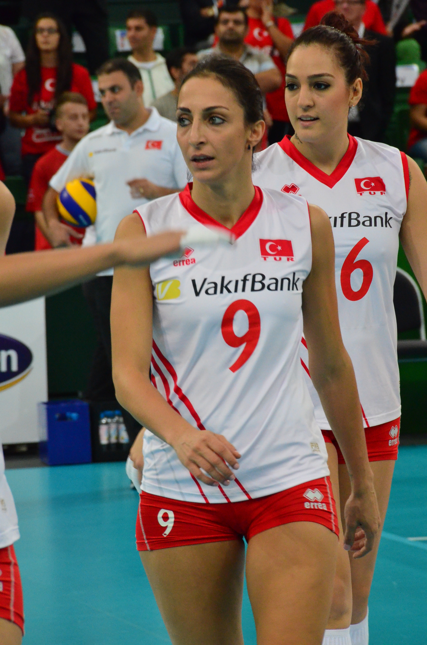 Volleyball-Europameisterschaft der Frauen 2013-Spielort Halle (Westf) Gerry-Weber-Stadion - Spiel 8. September 2013 (Deutschland-Türkei)